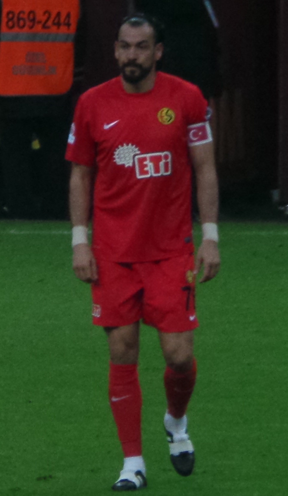 Servet Çetin'14